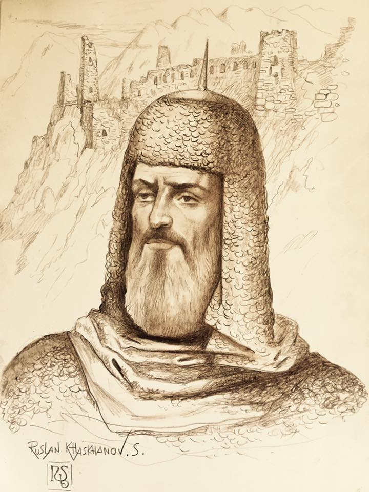 Шейх Мирза Окоцкий-чеченский